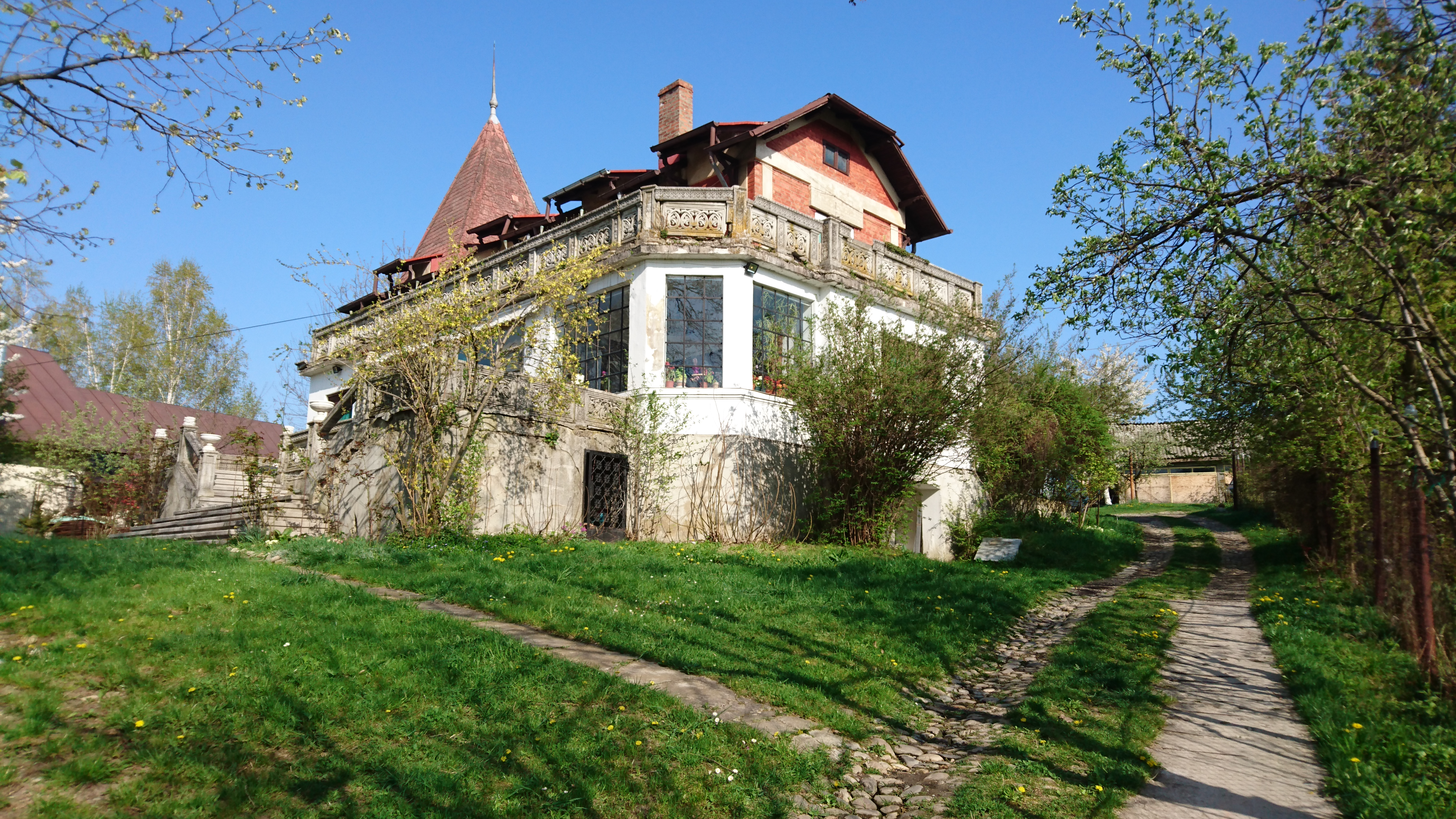 Casa „Baumberger”, Târgoviște, Dâmbovița.